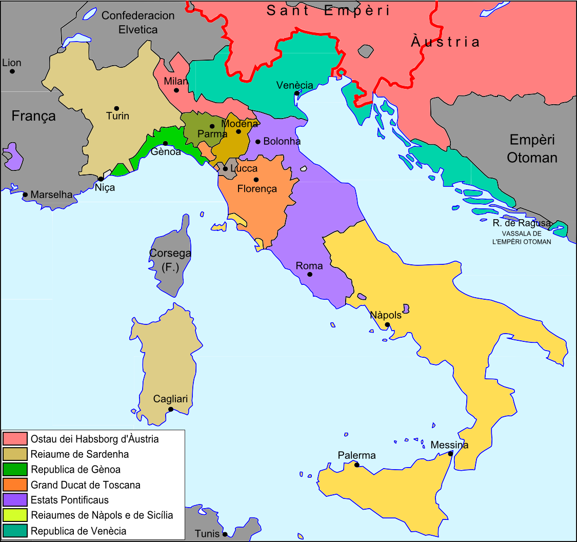 Itàlia en 1789 avans la Revolucion Francesa.